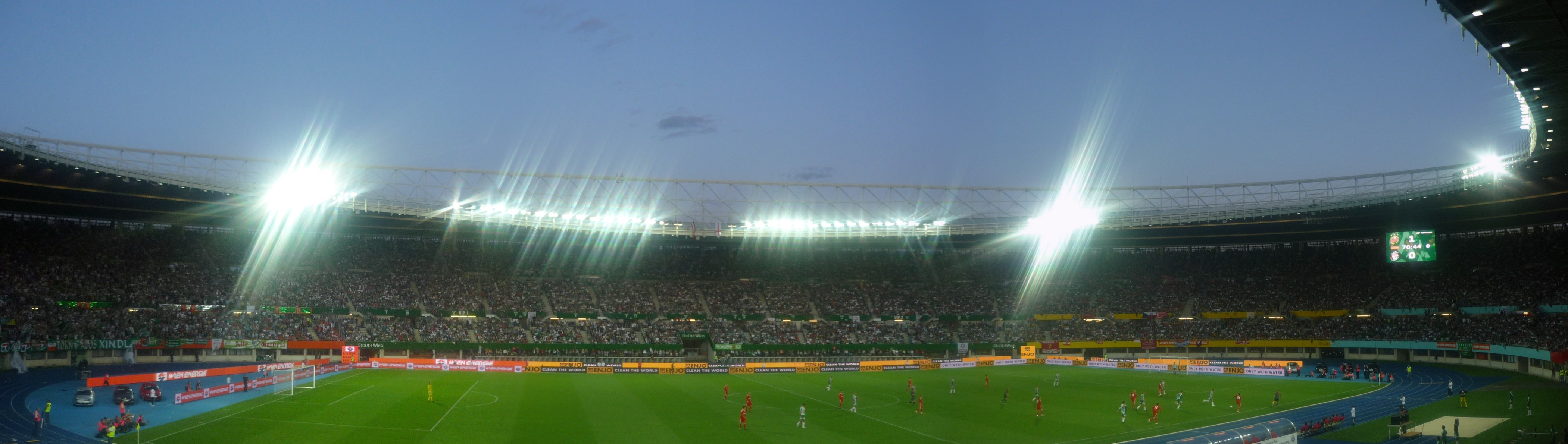 Das Ernst-Happel-Stadion in Wien, Österreich.